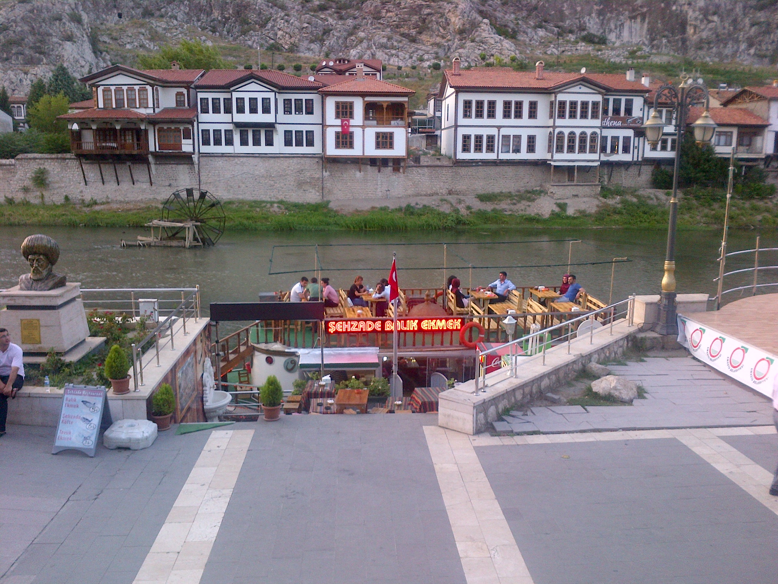 Rio "Yeşilırmak" a su paso por la ciudad de Amasya en el norte de Turquía.